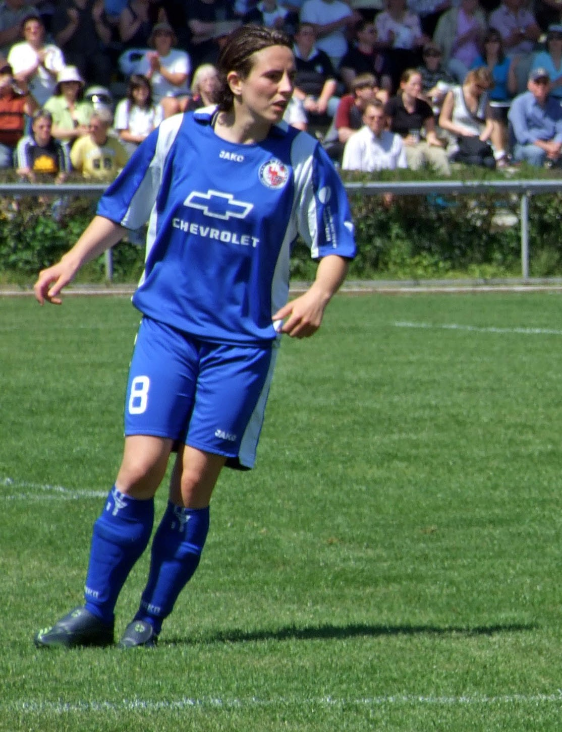 Aferdita Kameraj vom 1. FFC Turbine Potsdam, 2008